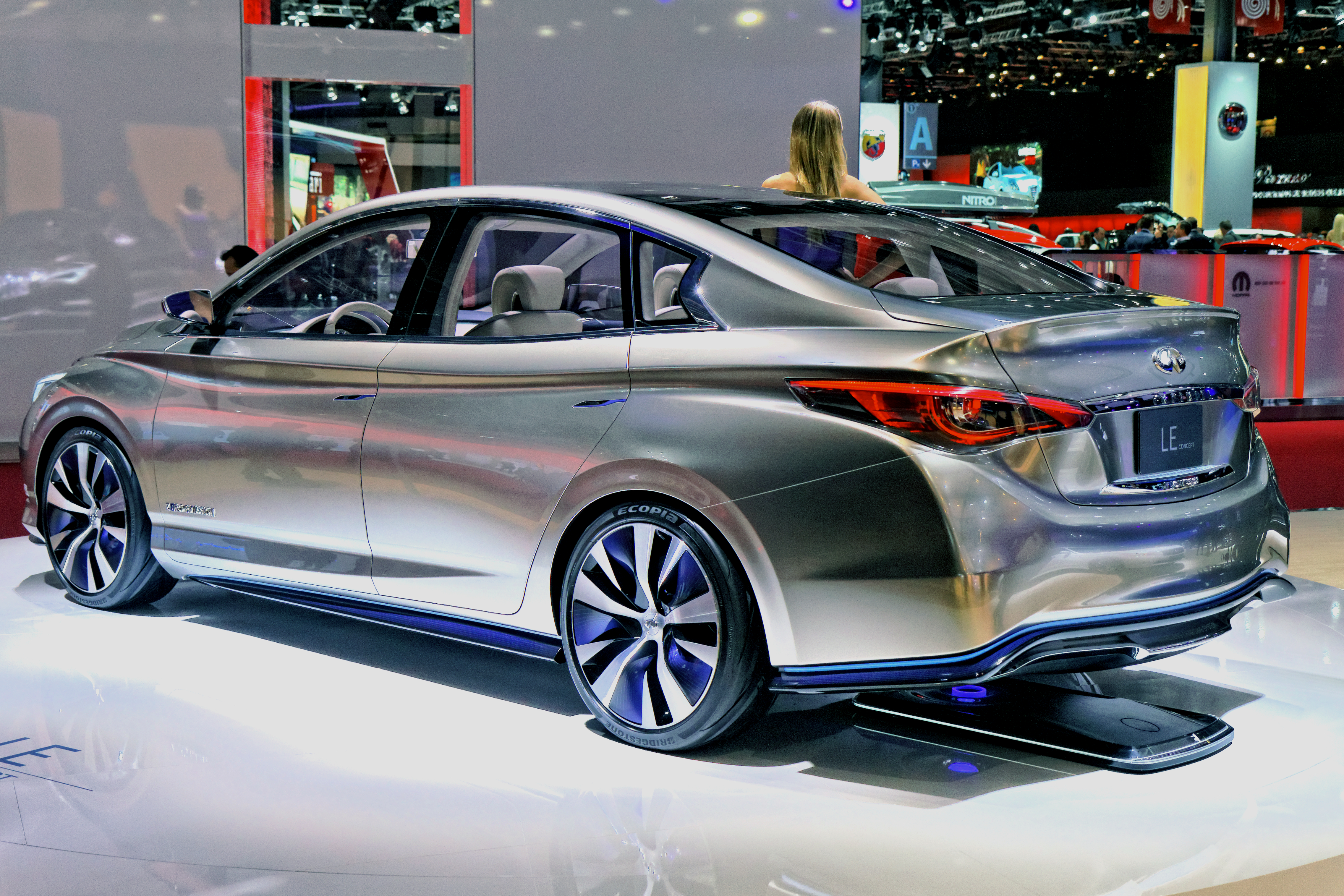 L'Infiniti LE Concept présentée lors du Mondial de l'Automobile de Paris 2012.